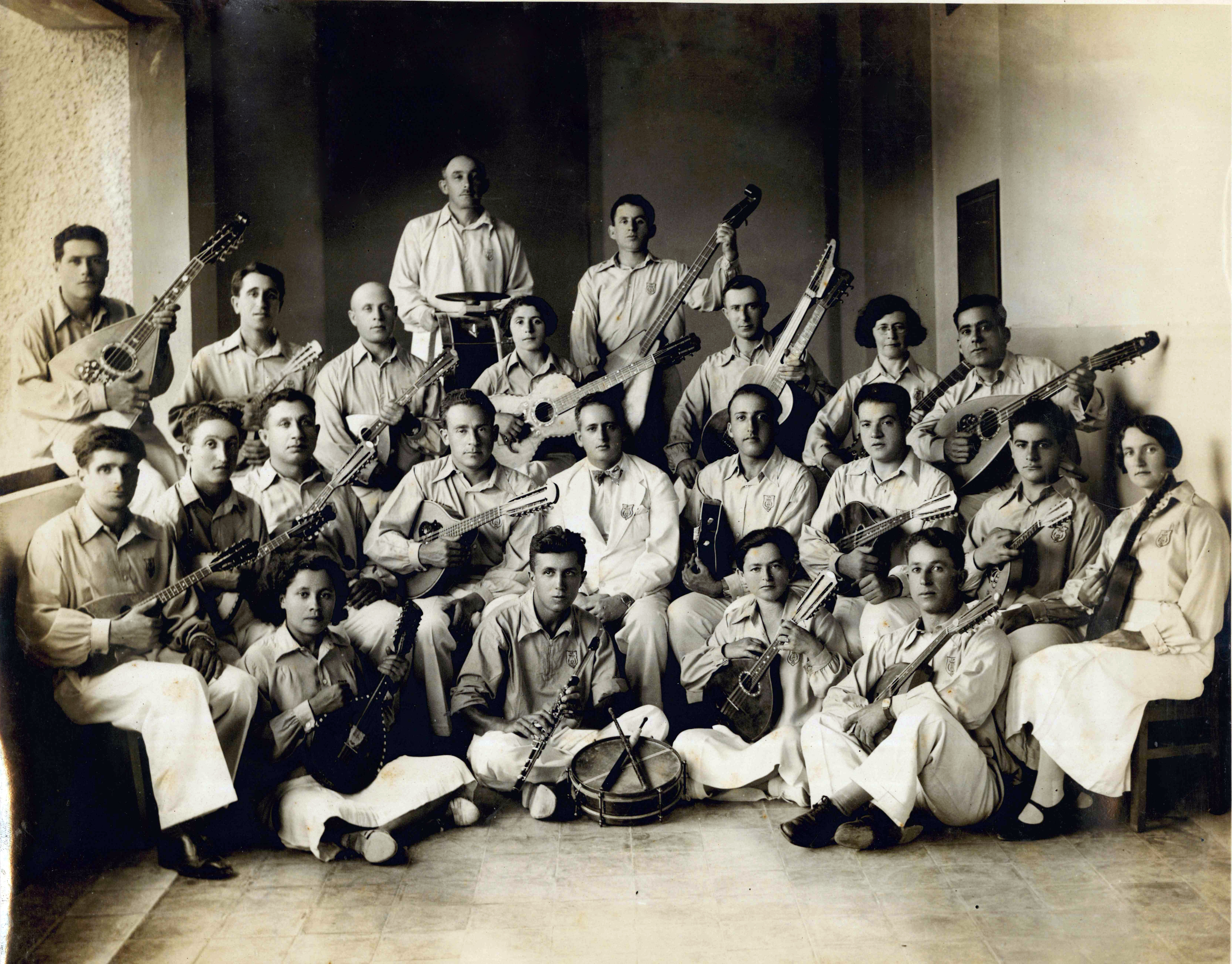 תזמורת כלי מיתר שפעלה בנשר משנות ה-20 ועד תחילת שנות ה-50 של המאה ה-20